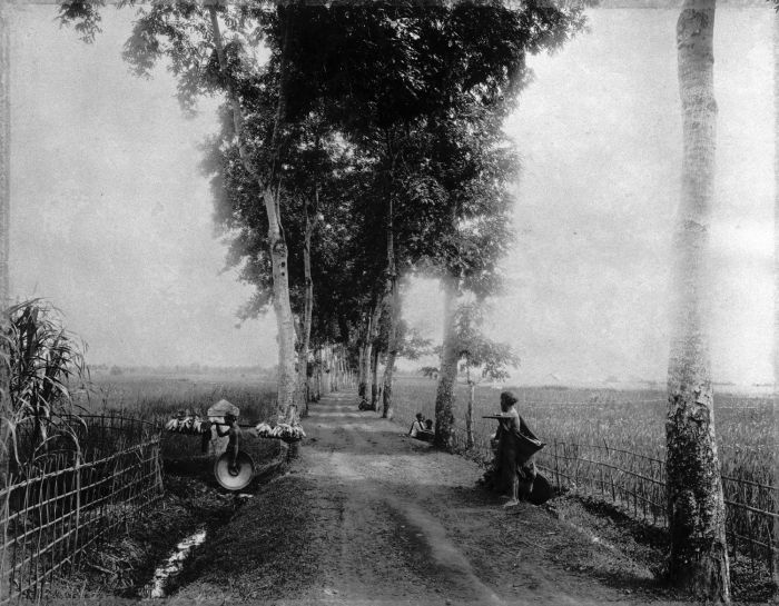 Foto. De weg naar de dessa Grendeng met links een rietsuikerveld.